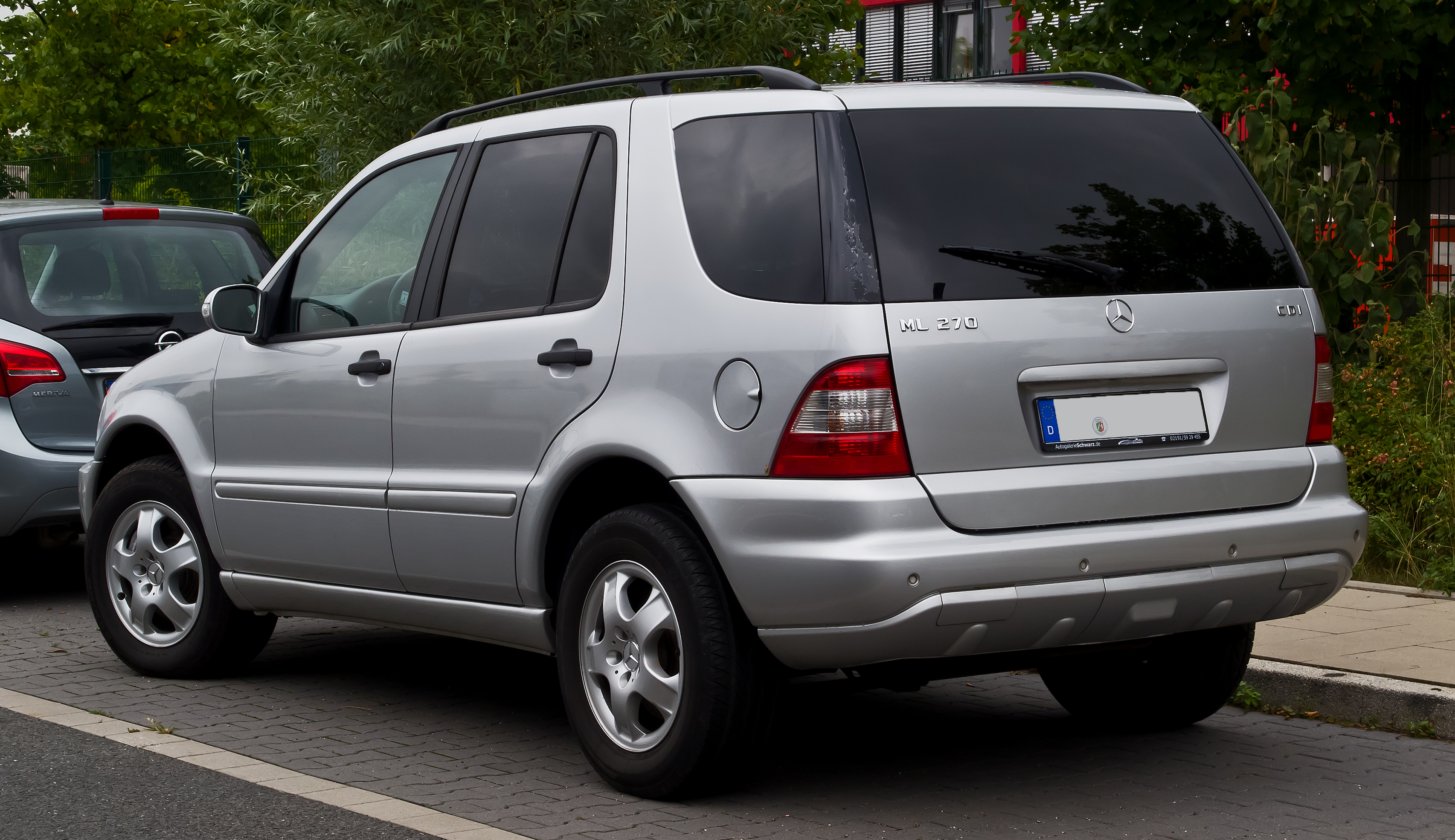 Mercedes-Benz ML 270 CDI (W 163, Facelift)